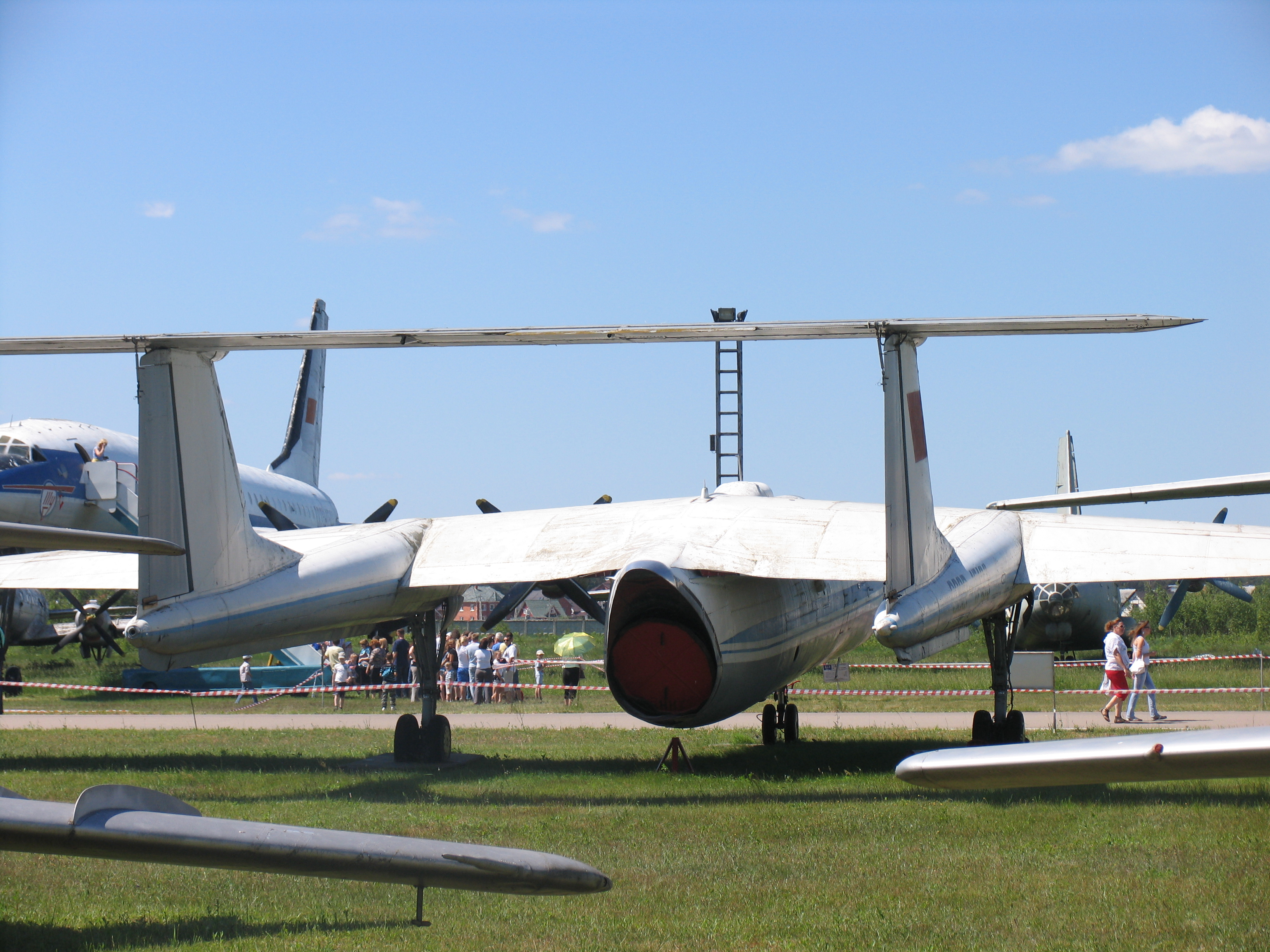 Вид сзади самолёта М-17.